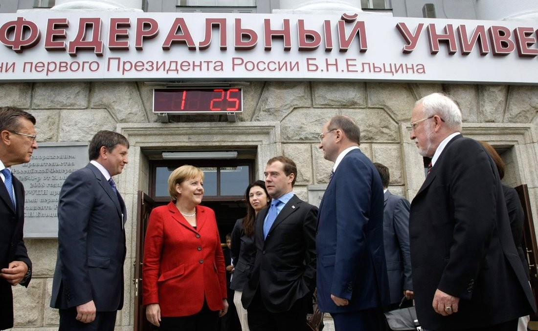 У здания Уральского федерального университета.